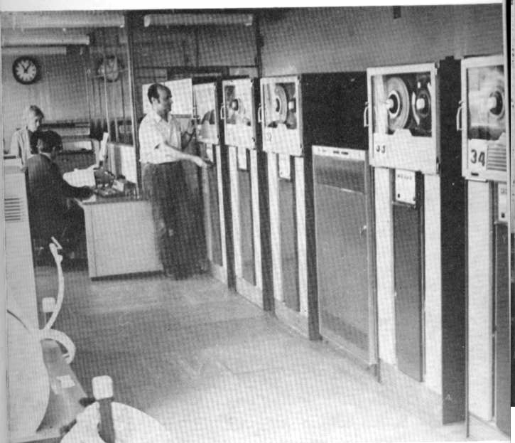 "Hardware Odry 1304 opiera się na elementach technicznych Odry 1204, a więc jest również oryginalną konstrukcją krajową". Thanasis Kamburelis, matematyk, jeden z głównych twórców rodziny polskiego komputera Odra